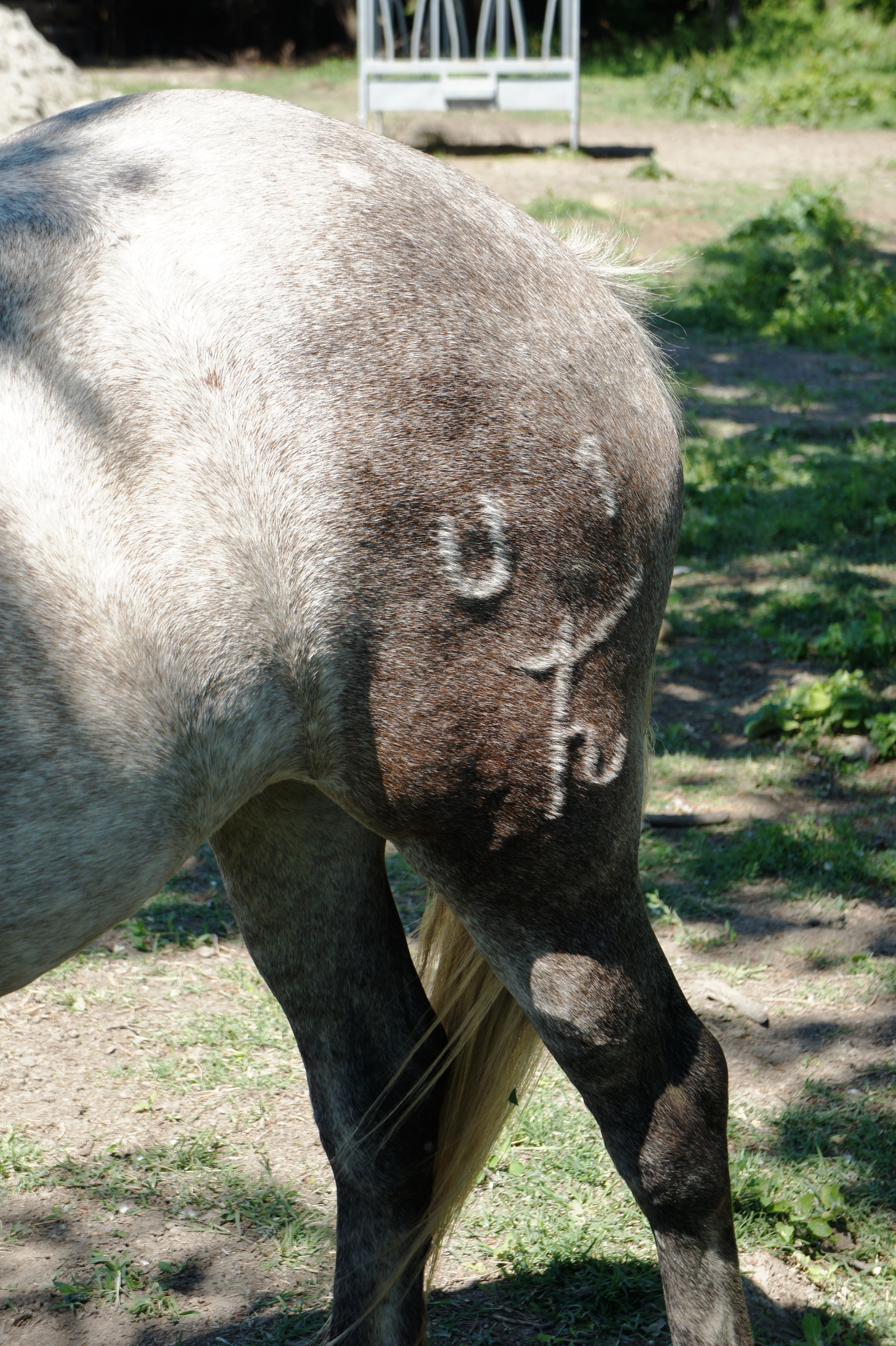 Erkennungszeichen an einem Camargue-Pferd bei Sylvéréal.